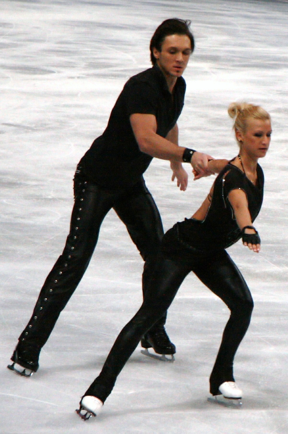 Татьяна Волосожар и Максим Траньков на 2011 Trophée Eric Bompard